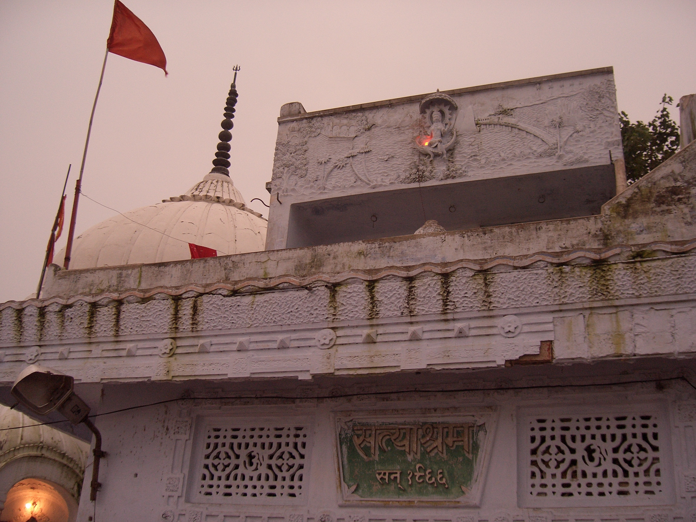 सत्ती चौरा घाट, कानपुर, उत्तर प्रदेश, भारत